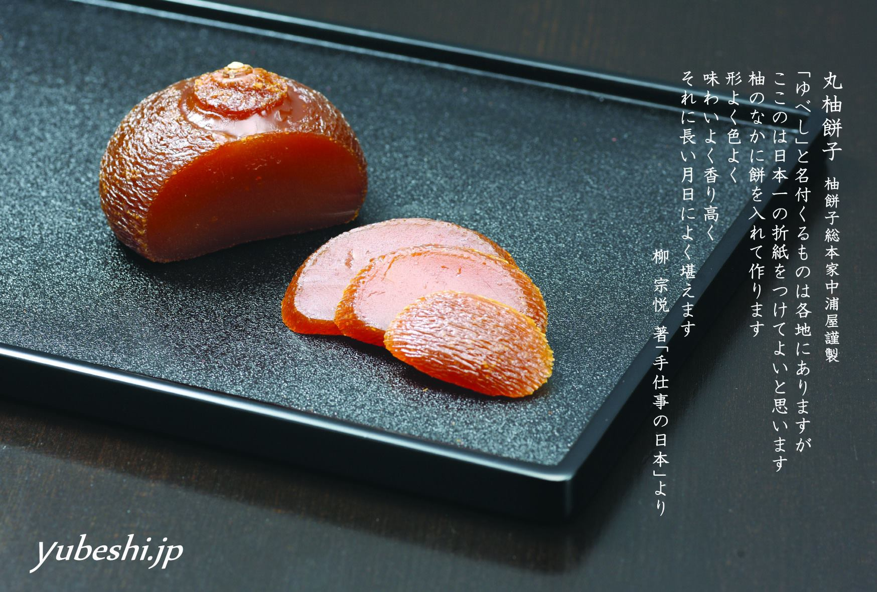 柚餅子総本家中浦屋の丸柚餅子は悠久の歴史をもつ柚餅子を丹念に磨きあげて現代に引き継いでいます。伝統を大切に進取な姿勢で製造した丸柚餅子です。